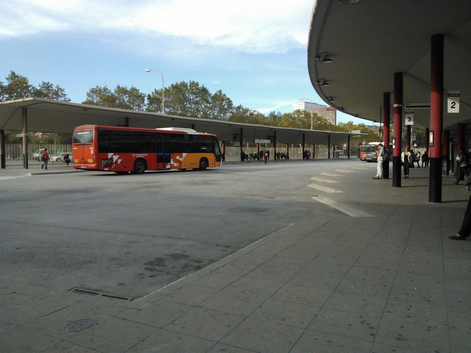 Autobús interurbà/urba a Barcelona